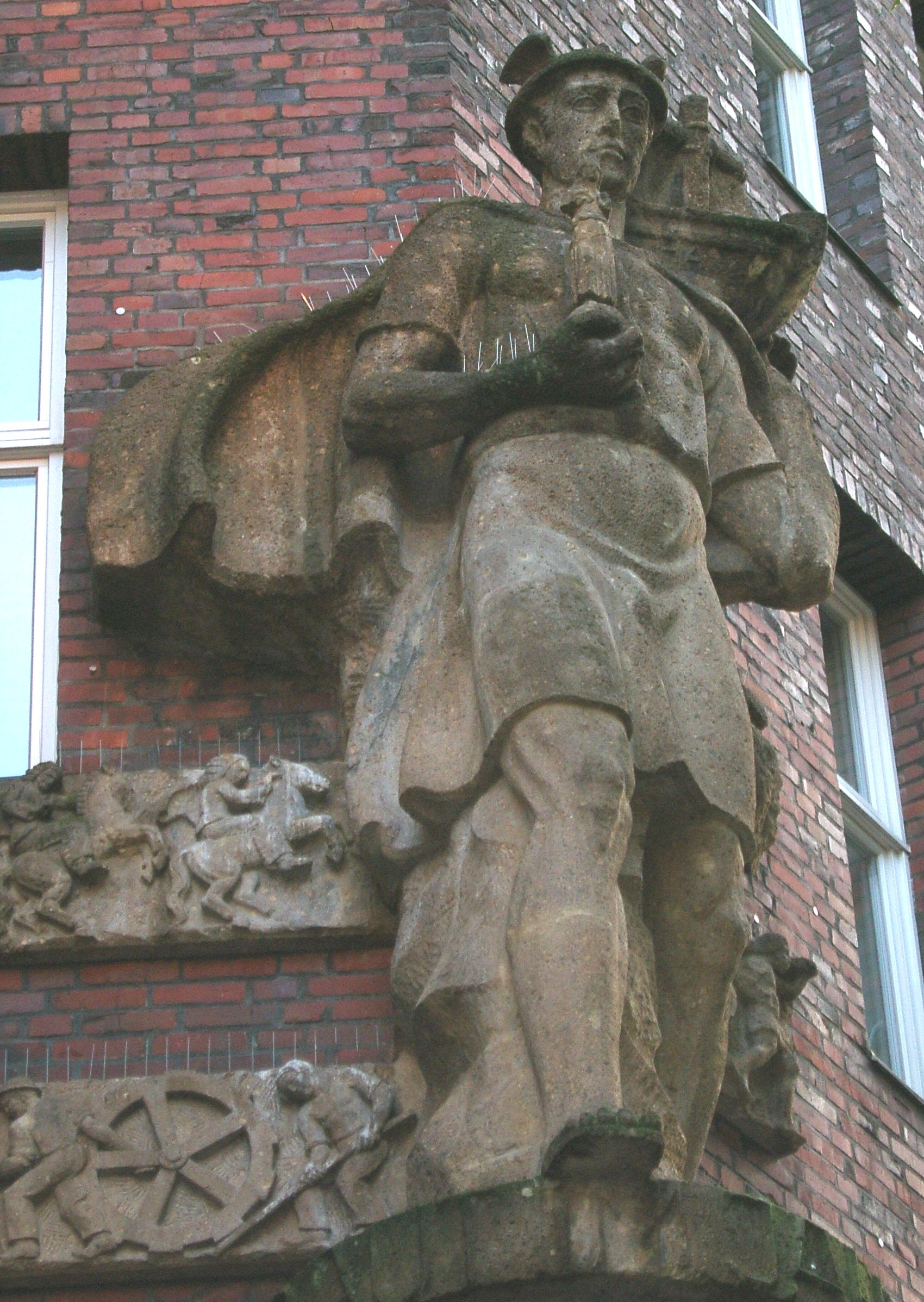 Hamburg, Kontorhausviertel, This is a photograph of an architectural monument.